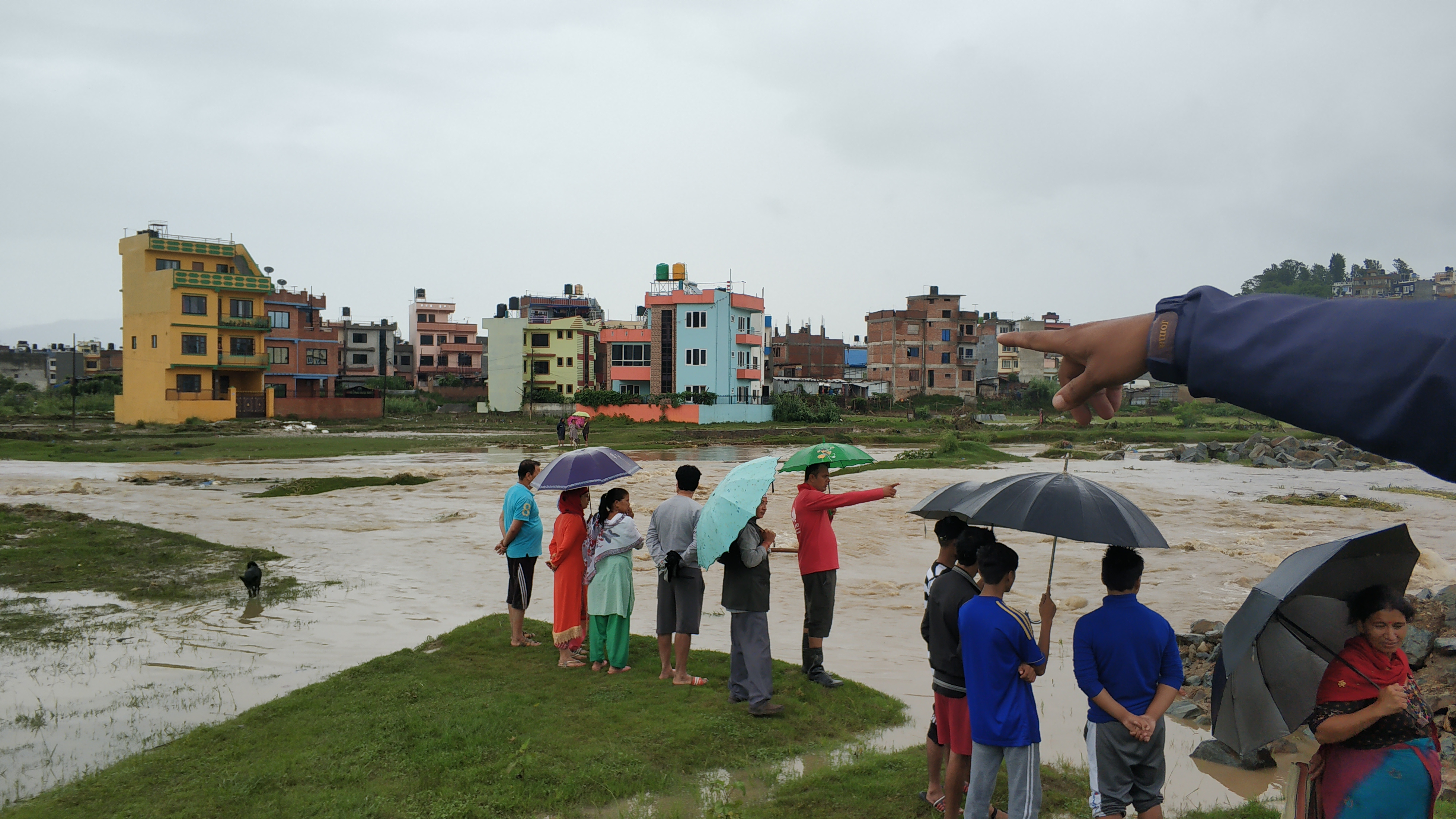 नेपाली: कर्मनसा खोलामा २०७६ सालमा आएको बाढी।